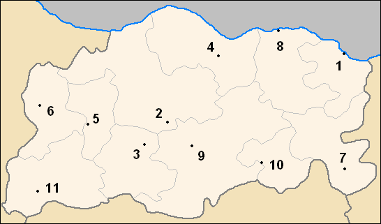 Плевенская область Болгарии, общины